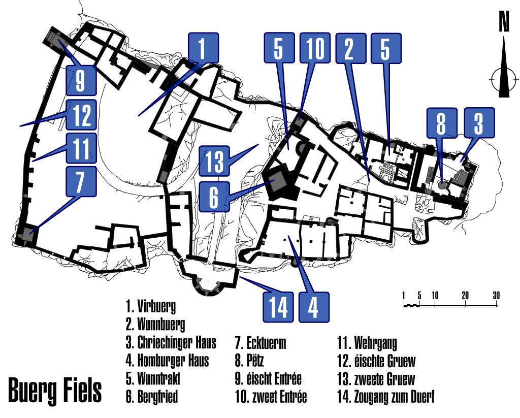 Plan du château de Larochette (Luxembourg). Légende en luxembourgeois.